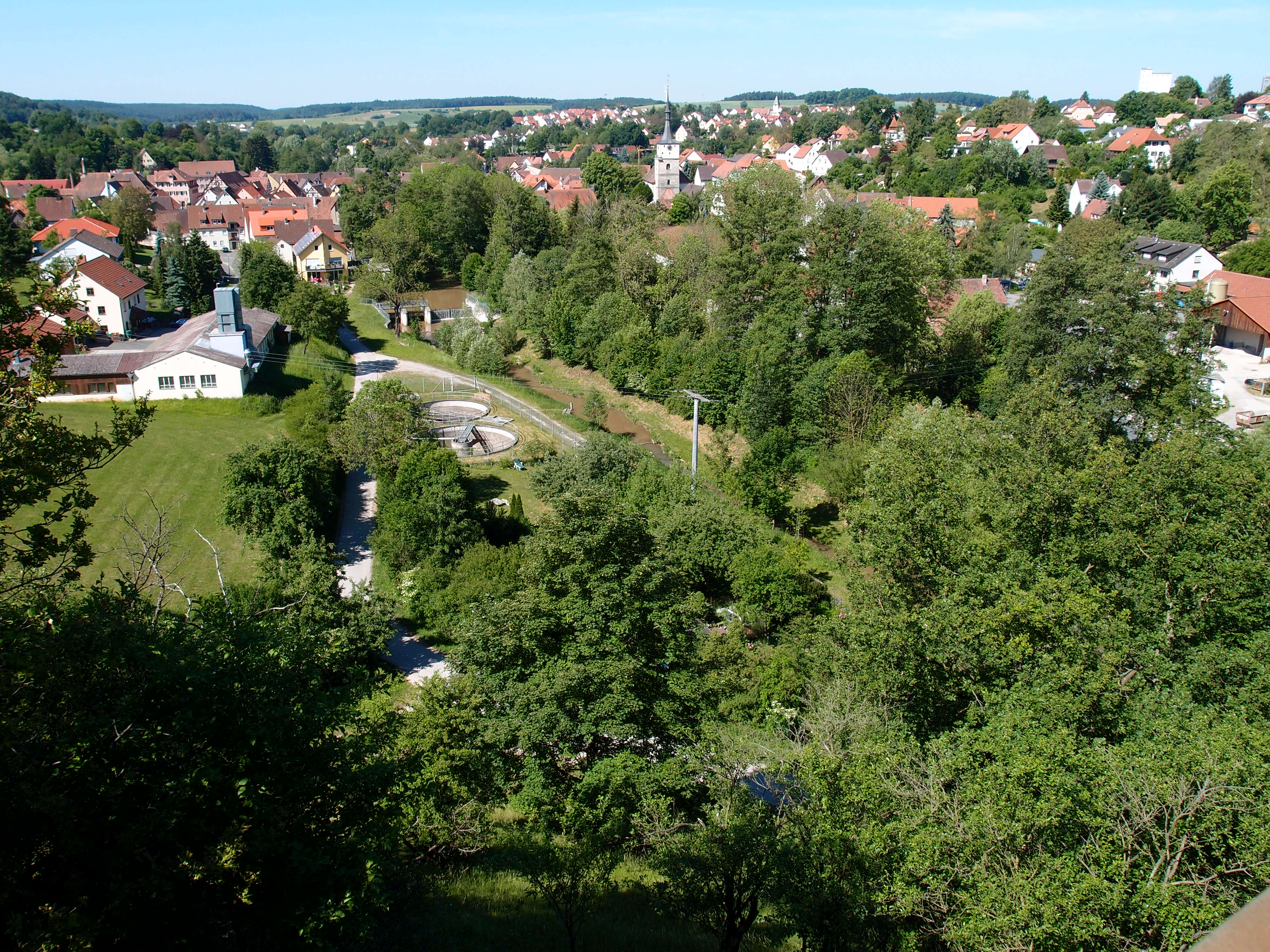 Blick auf Emskirchen von der Bahnbrücke östlich oberhalb des Ortes